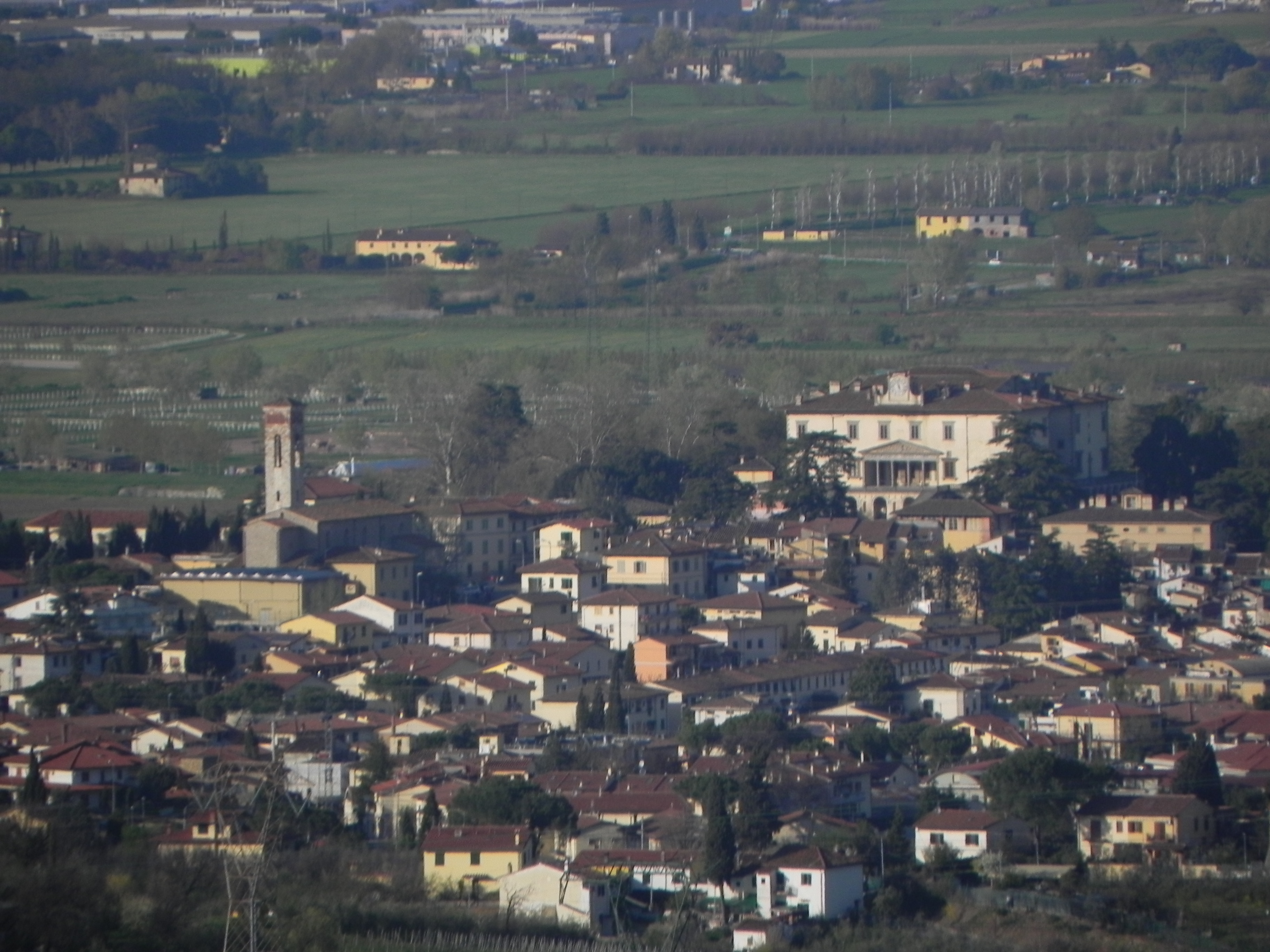 Vista di Poggio a Caiano da Artimino. Visibili a destra la Villa Medicea e a sinistra la chiesa di Poggio, sullo sfondo a sinistra visibili anche le Cascine di Tavola. L'immagine è zoomata per inquadrare il paese.